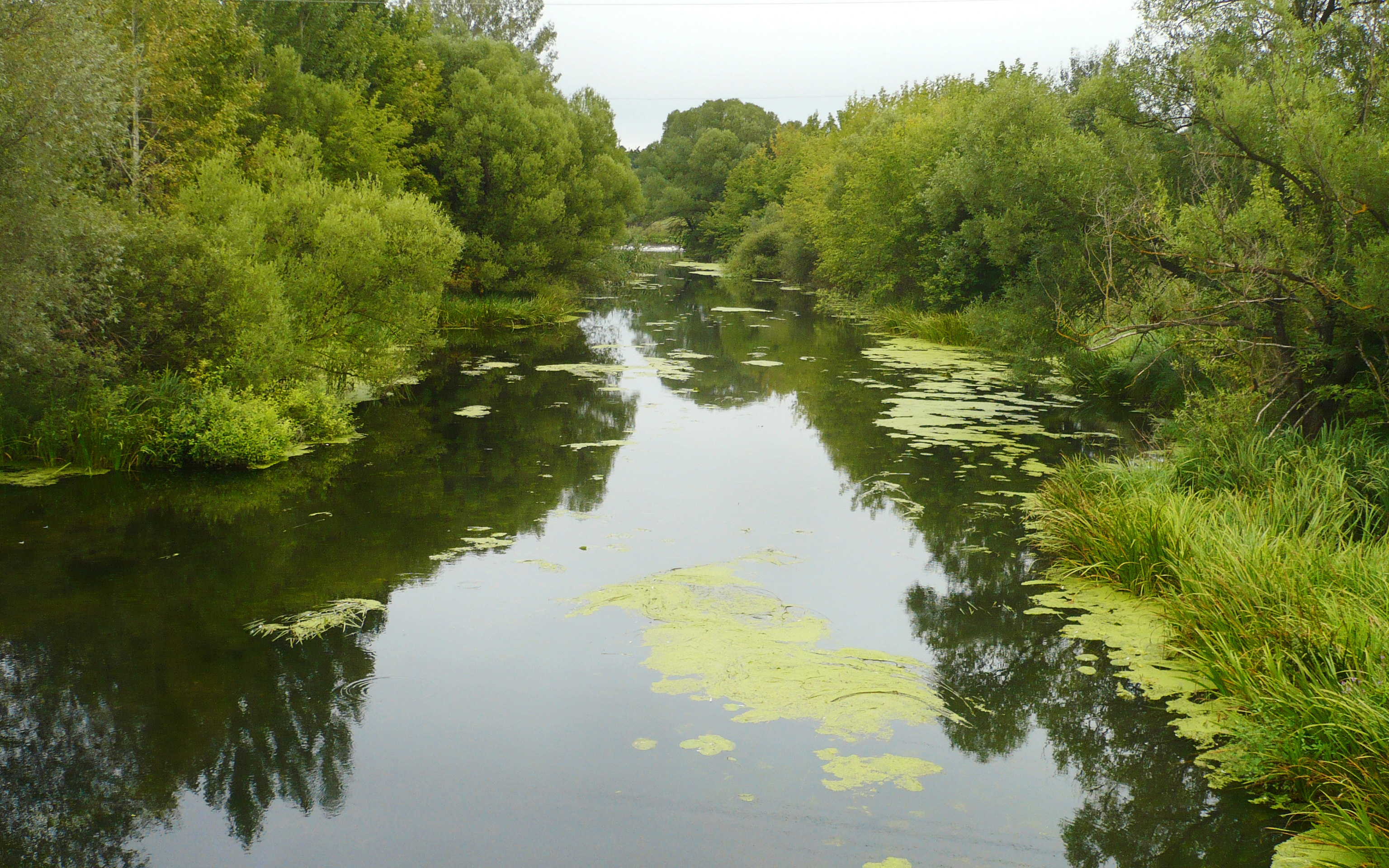 Река Короча близ села Доброе в шебекинском районе Белгородской области. Август 2012 г.